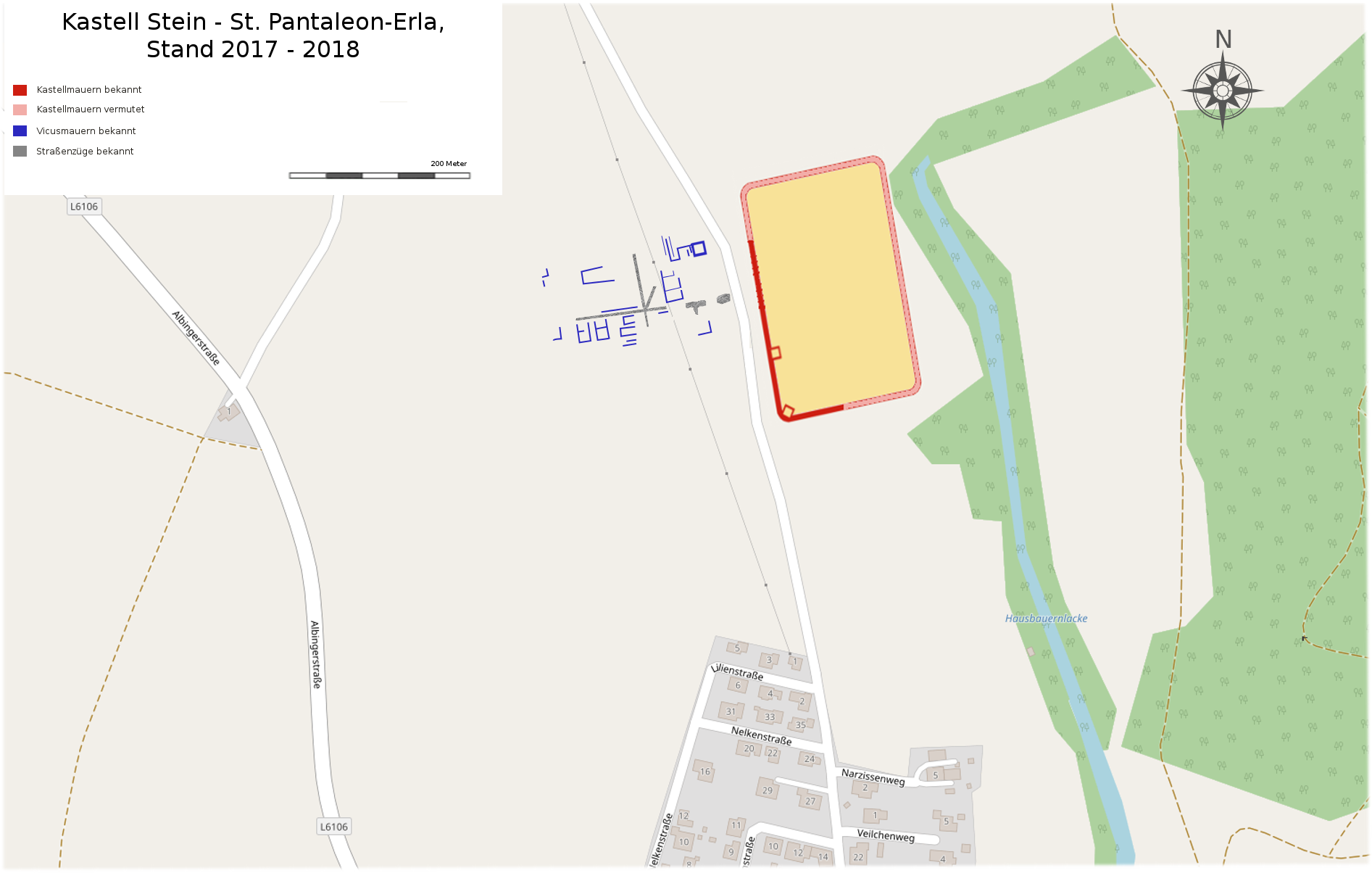 Befundskizze des norischen Hilfstruppenkastell St. Pantaleon/Stein, Stand 2017-2018.